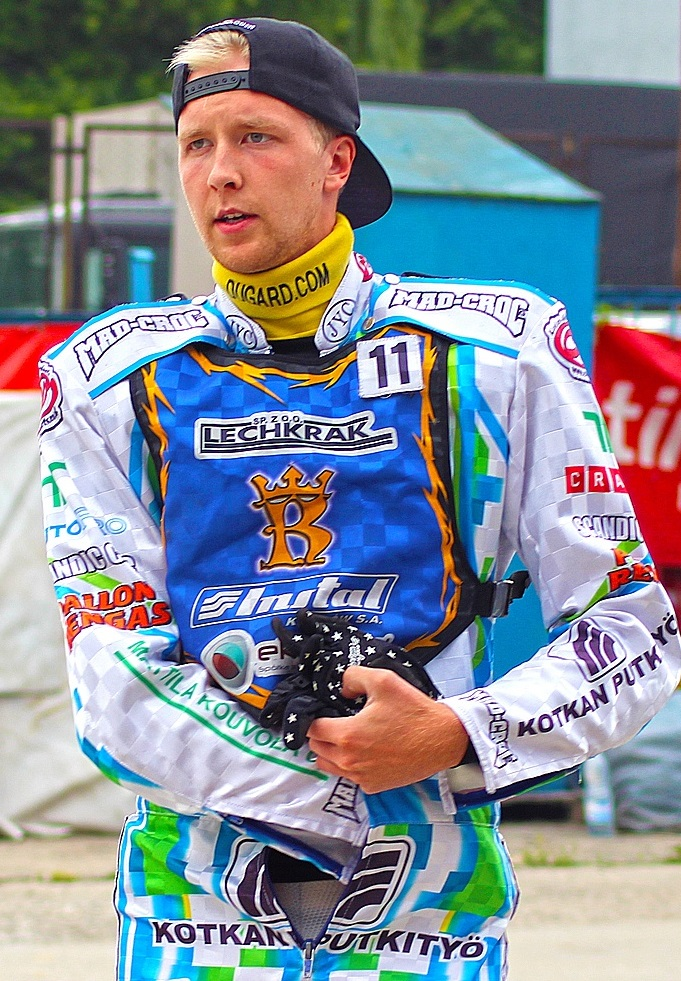 Timo Lahti (fot.Mateusz Biskup)